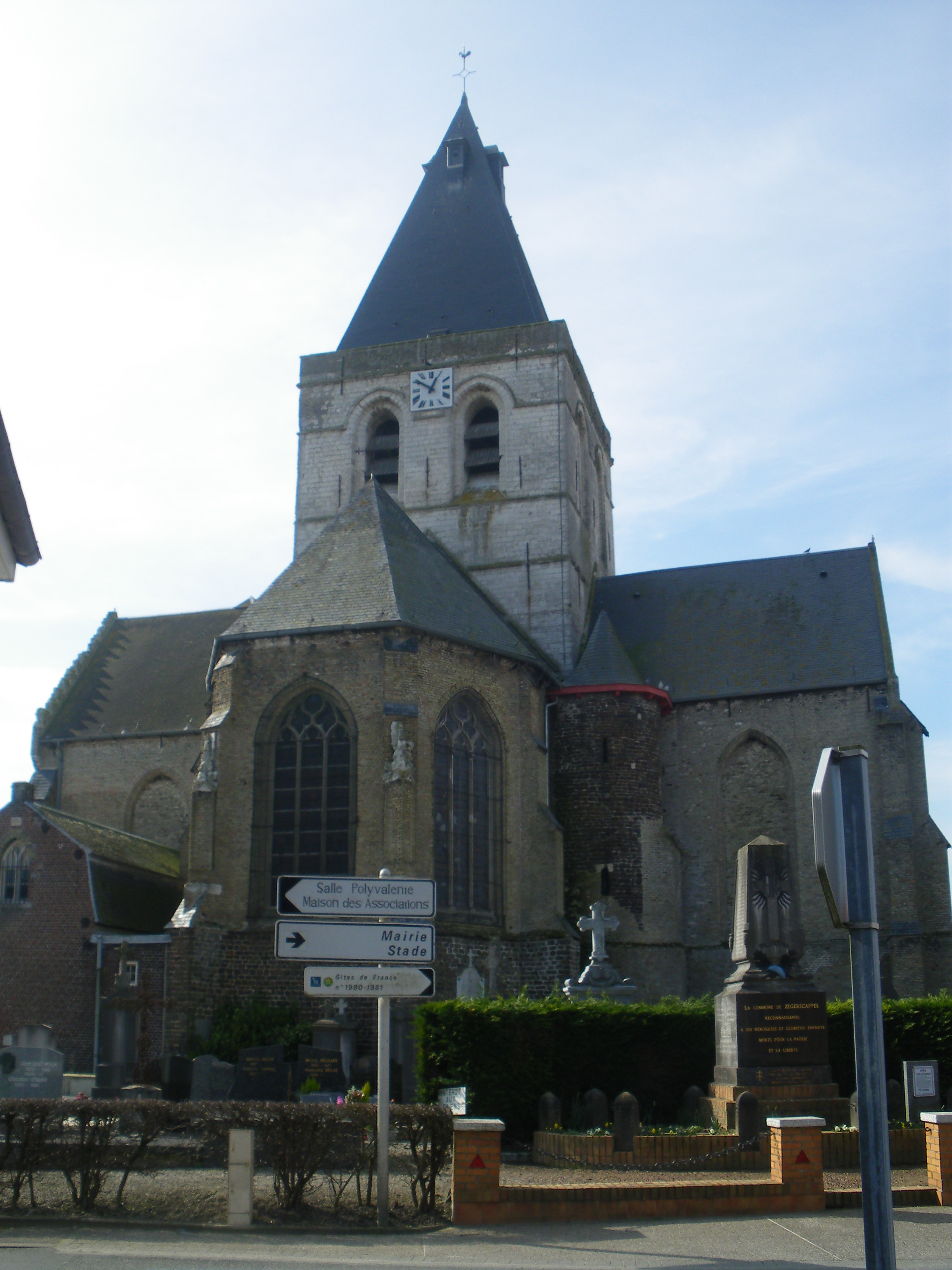 Vue de l'église Saint-Omer de Zegerscappel . A côté figure le monument aux morts.